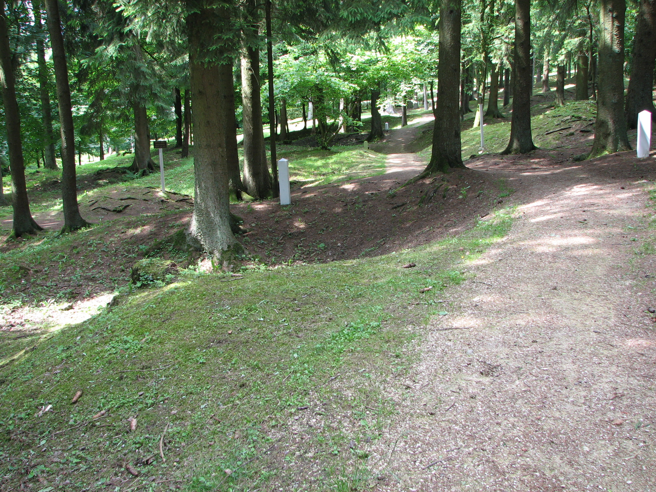 Emplacement des rues de Fleury-devant-Douaumont, village détruit pendant la Première Guerre mondiale. Les bornes blanches marquent l'emplacement des maisons, les panneaux celles des rues. Le relief tourmenté est dû à la pluie d'obus.